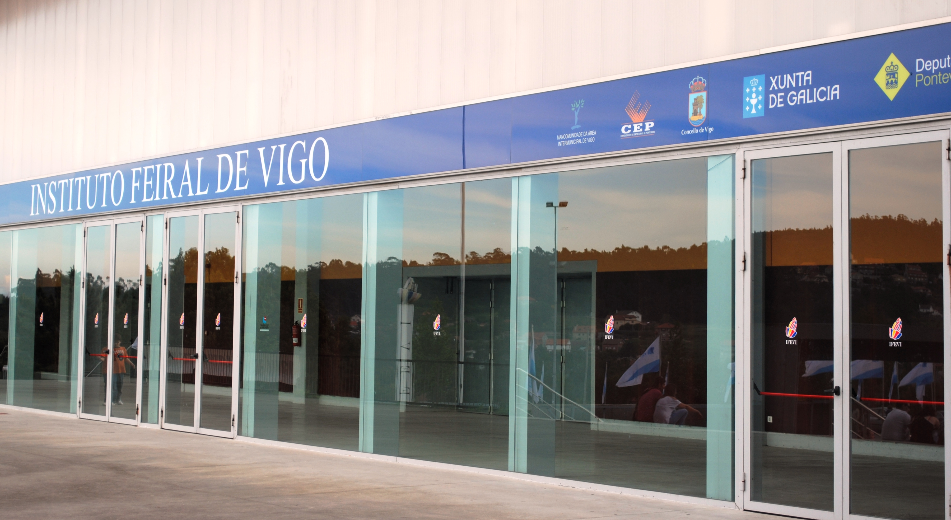 IFEVI (Mancomunidade, CEP, Concello, Xunta, Deputación e Cámara).JPG